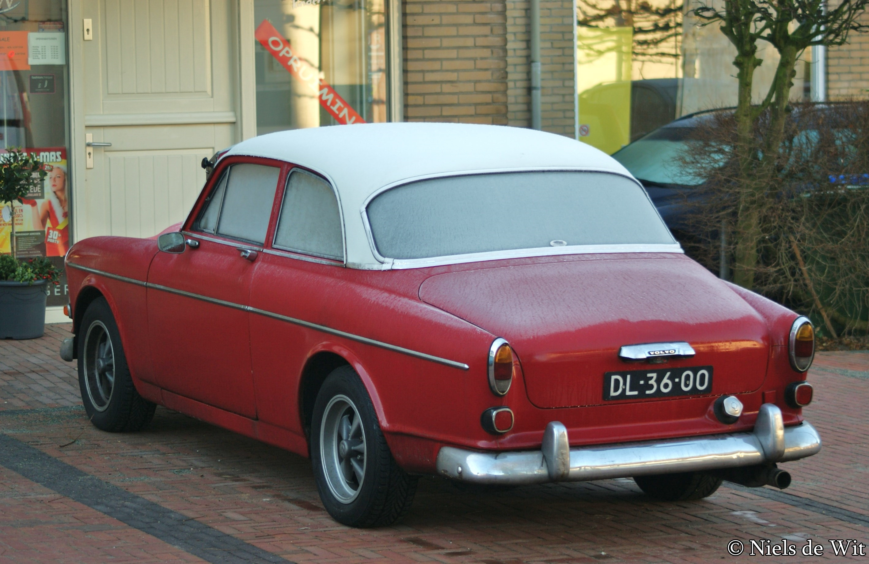 DL-36-00